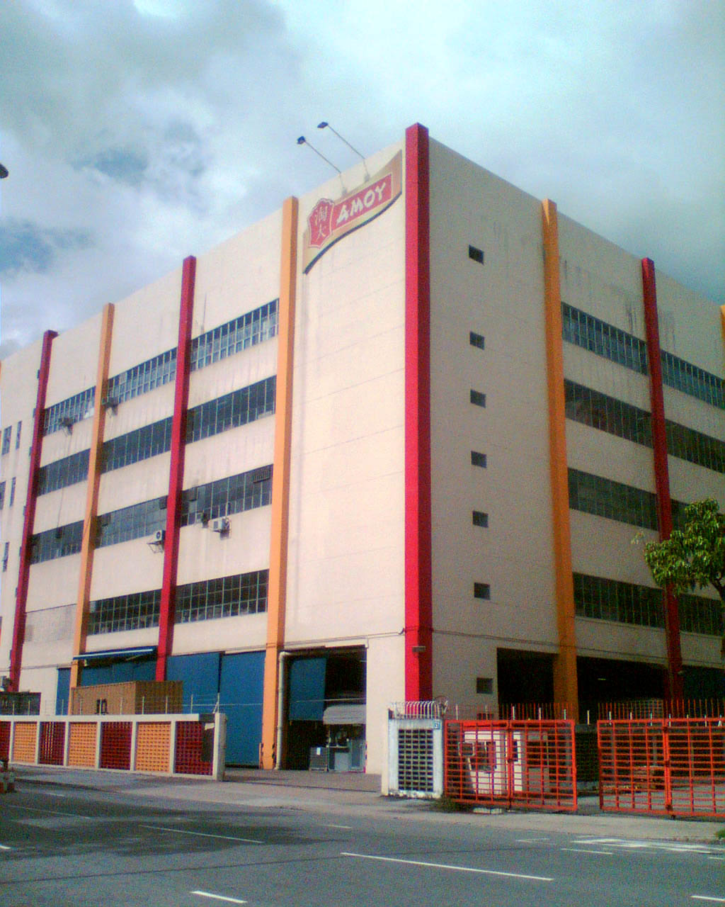 淘化大同食品